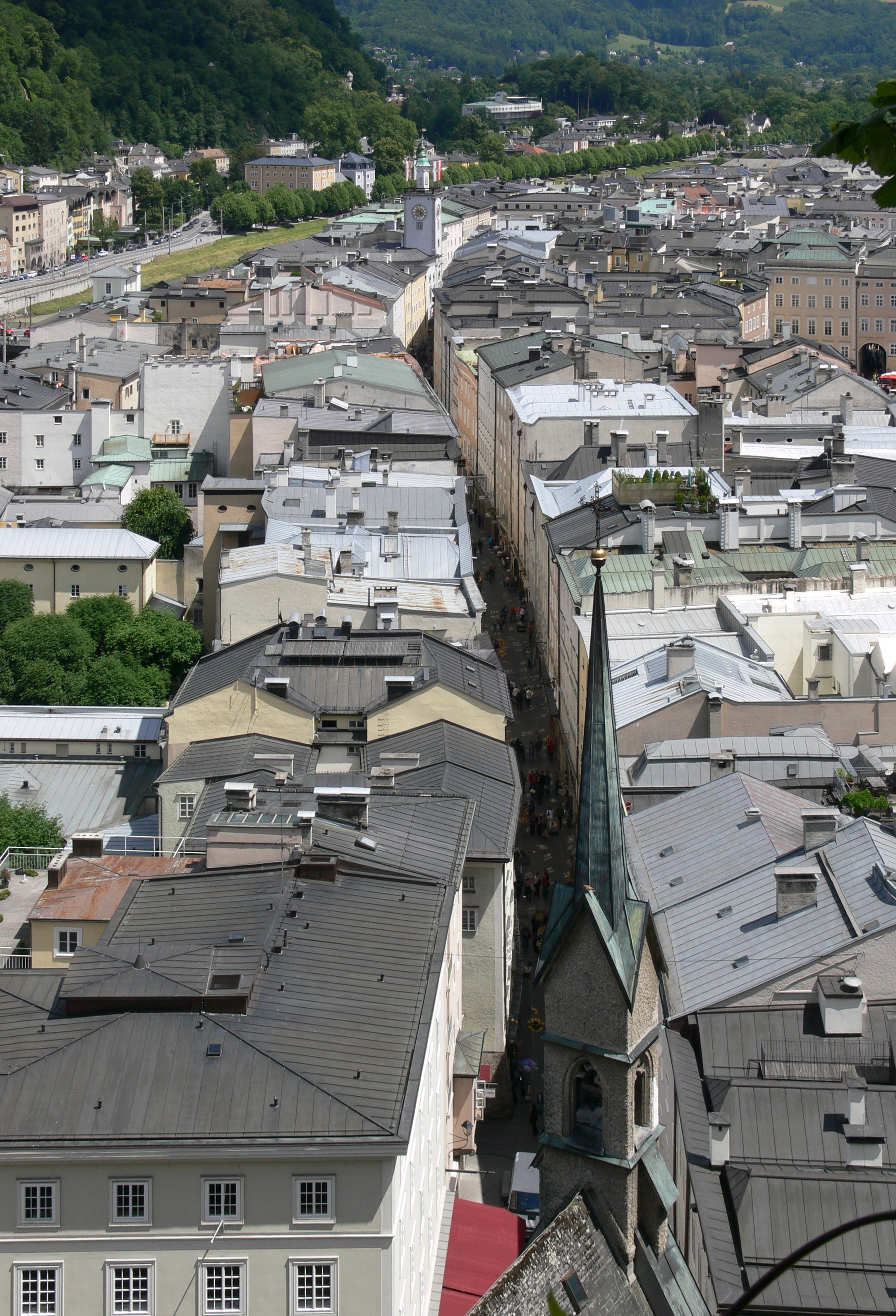 Salzburg, Aussicht vom Mönchsberg Getreidegasse